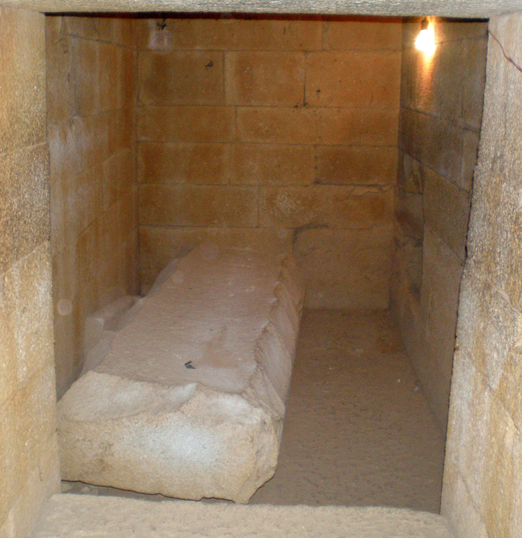 Tomb under Aksum Great Stela Field (Sarcophage dans une salle souterraine sur le site des grandes stèles d'Axoum - photo personnelle prise le 6 décembre 2007)